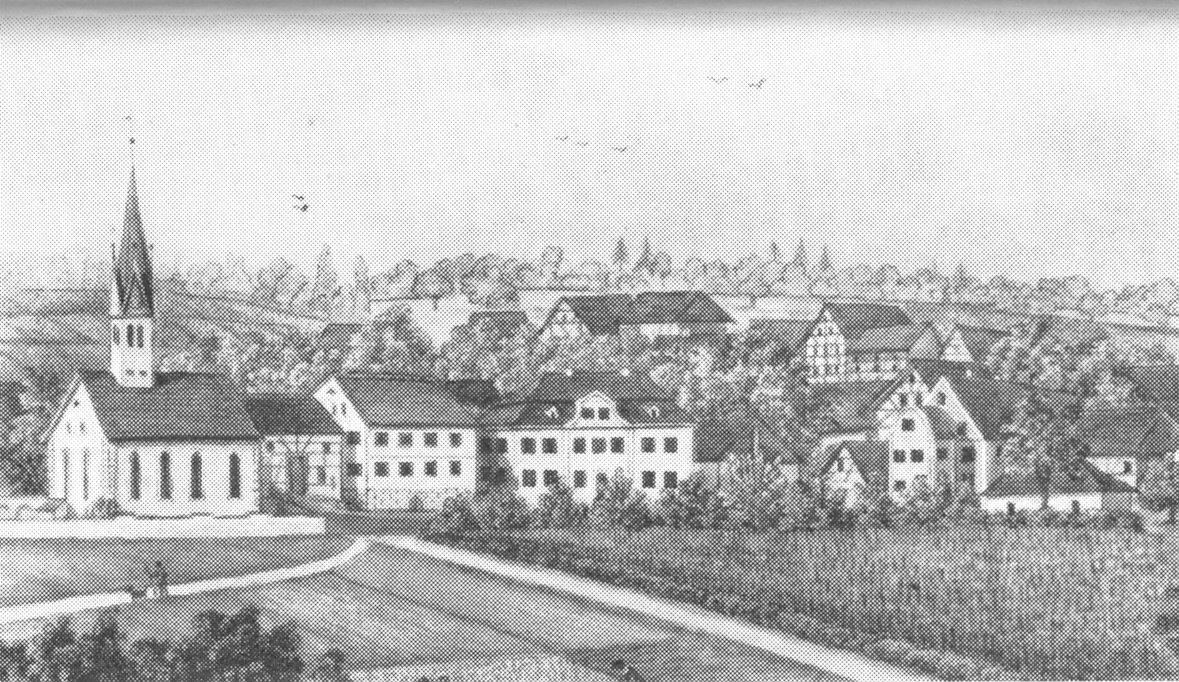 Dorfbild von Egelshofen, Kt. Thurgau. Von links nach rechts: Kirche, Pfarrhaus, Rosenegg, Olbrechtsches Gut.